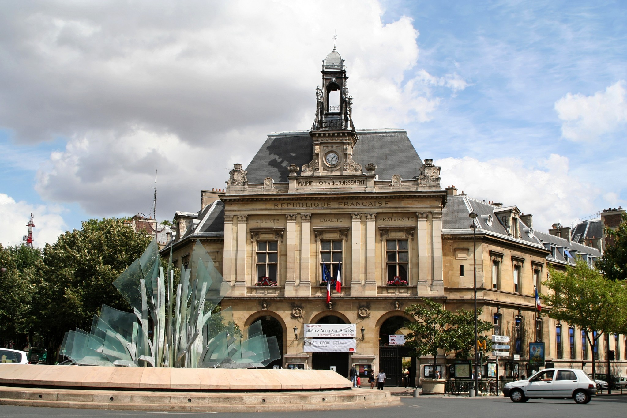 Mairie du 20 ième arrondissement de Paris